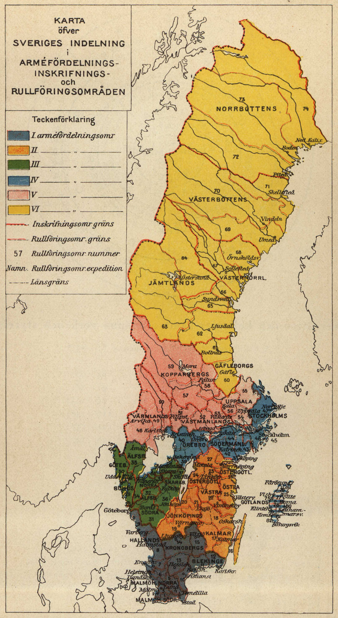 "Karta öfver Sveriges indelning i Arméfördelning-, Inskrifnings- och Rullföringsområden" 1908